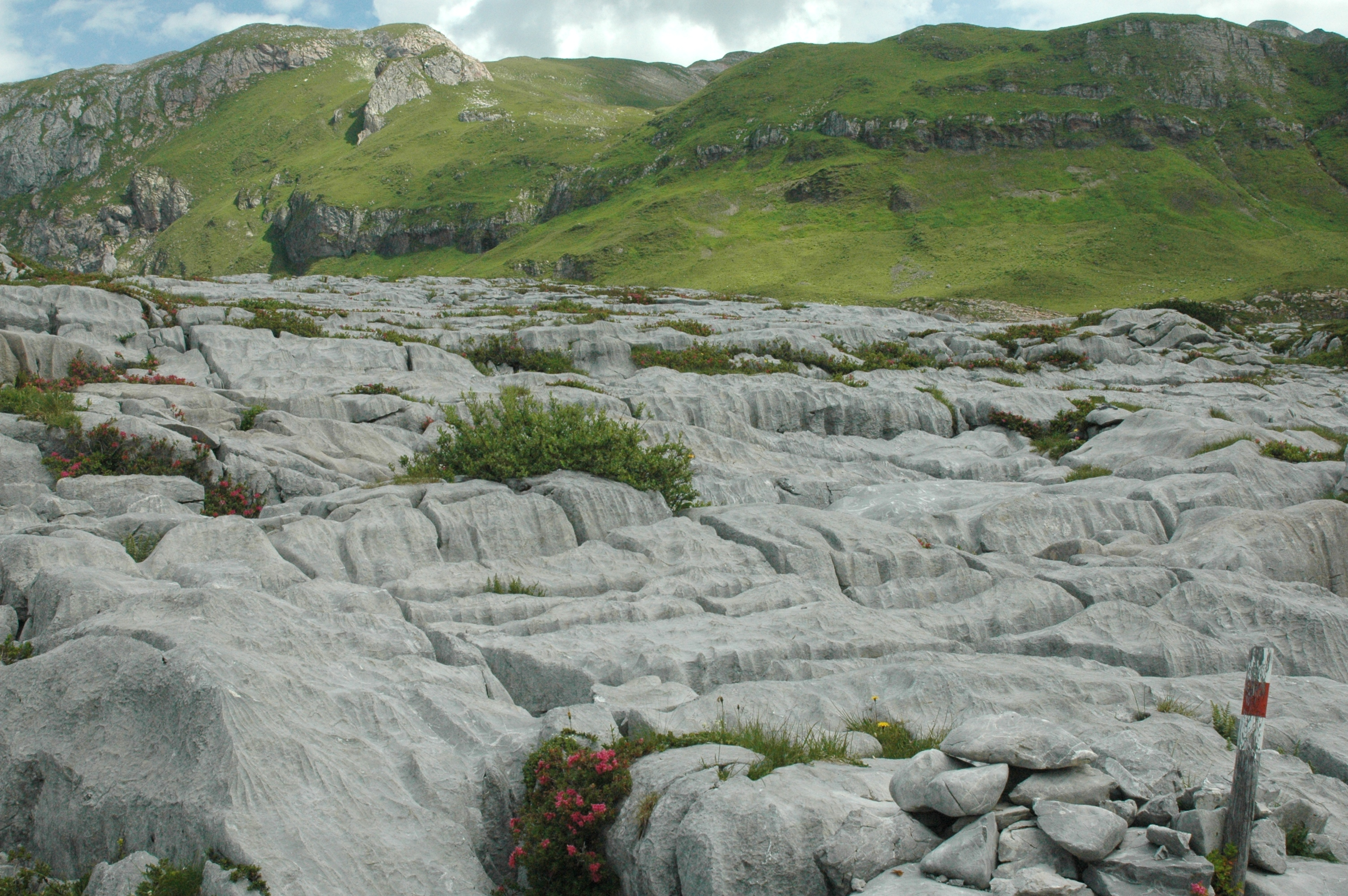 Karst Phänomen "Karren" (auch "Schratten"), Steinernes Meer im Lechquellgebirge (Vorarlberg)